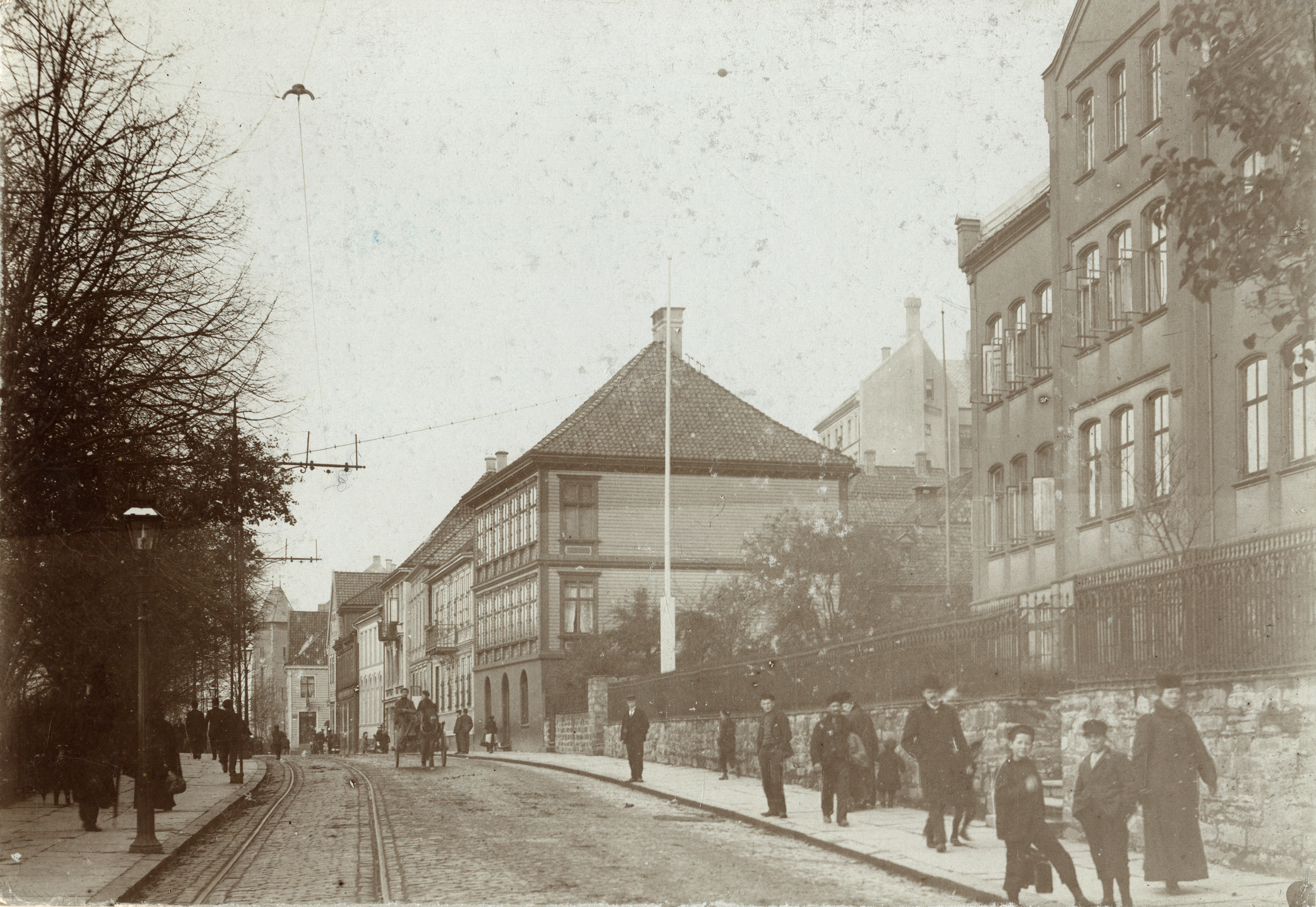 Øvregate, Hordaland This image on crowdsourcing geotagging platform Fotodugnad